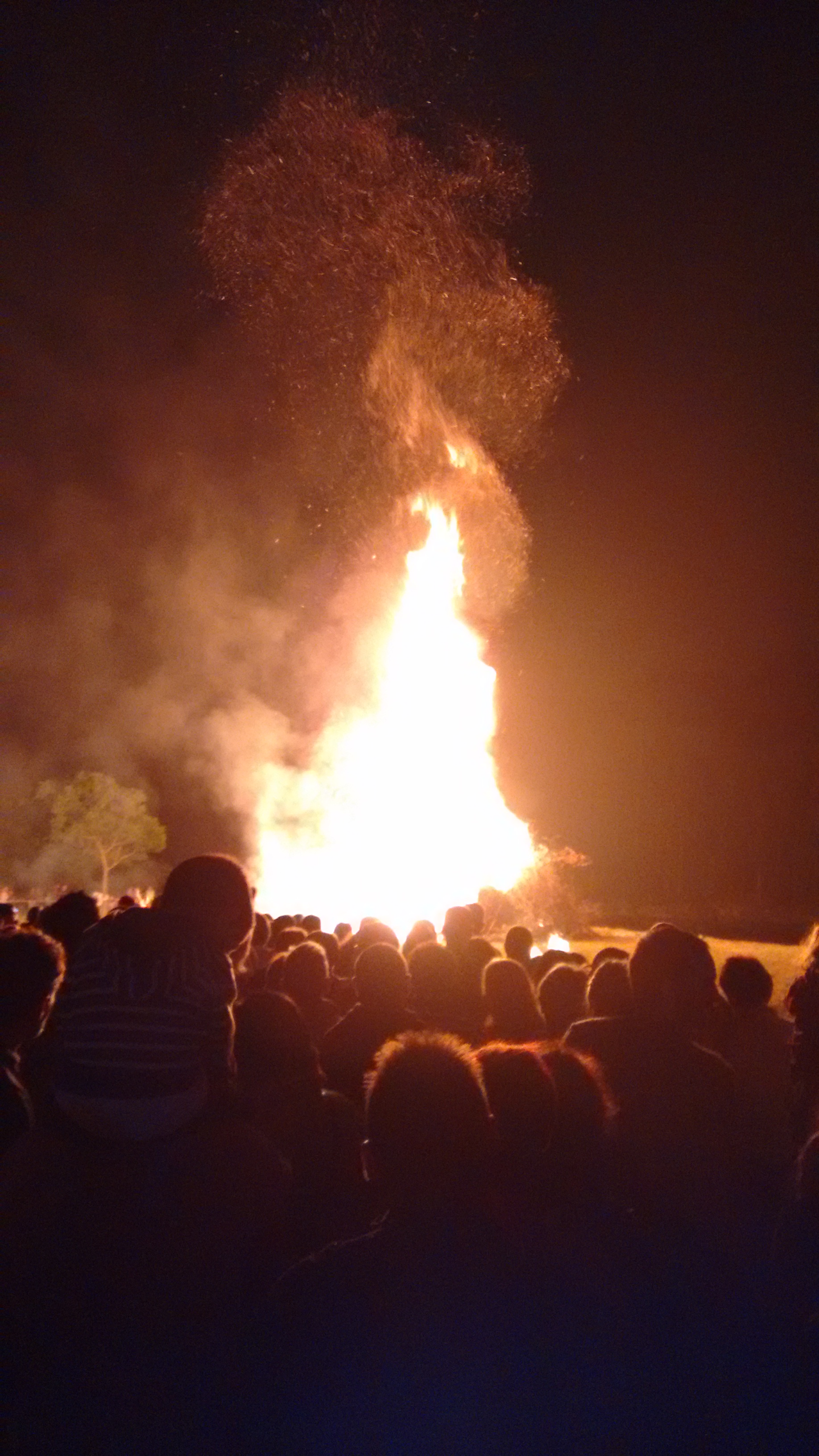 fogueira, lume, sanxoán,poio